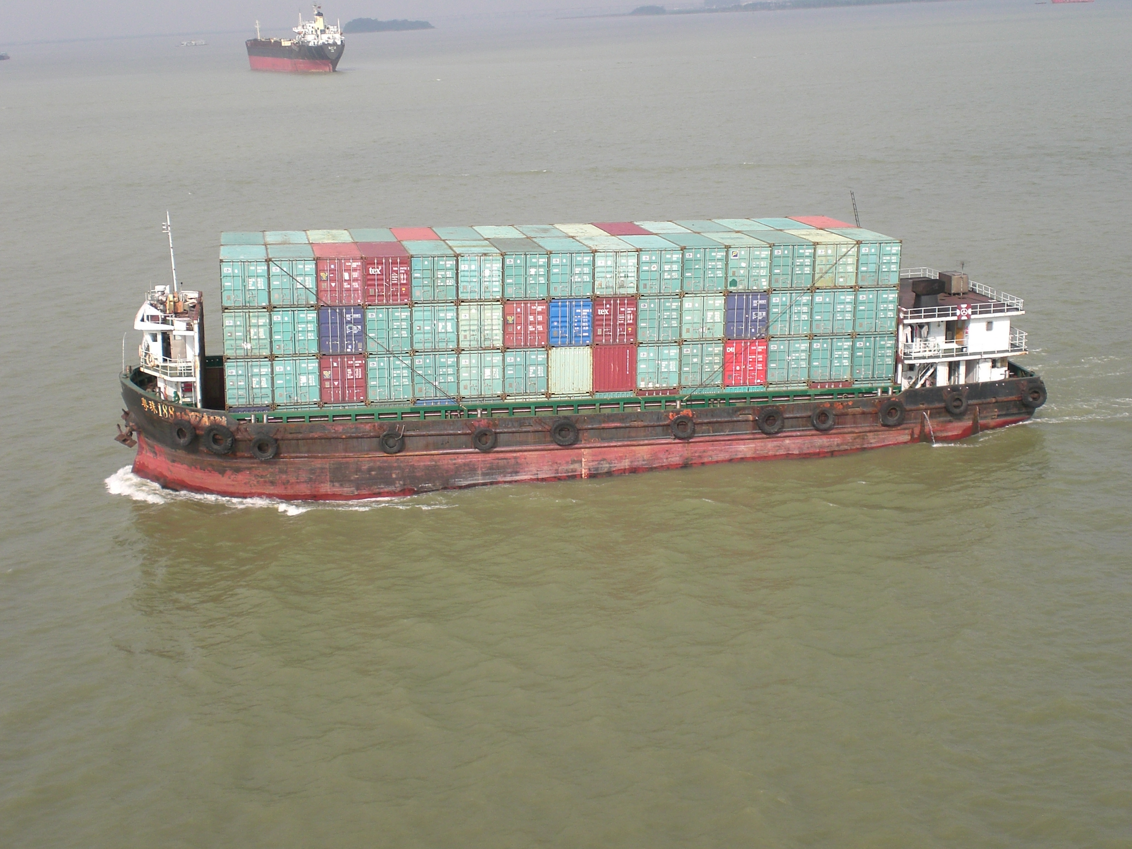 Chinesisches Containerbinnenschiff